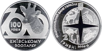 Файл:100 років Київському зоопарку.png: монета України